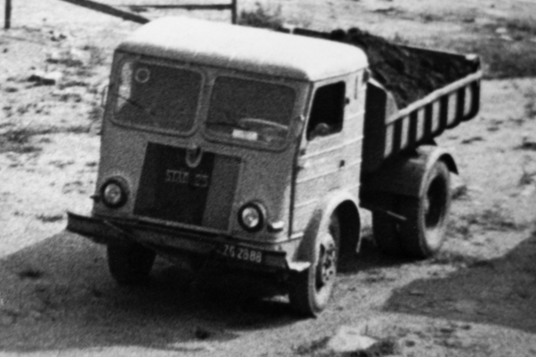 Star W25 - wywrotka ze skrzynią ładunkową przechylaną do tyłu. W latach 60 i wczesnych 70, podstawowy samochód na placach budów w PRL-u.